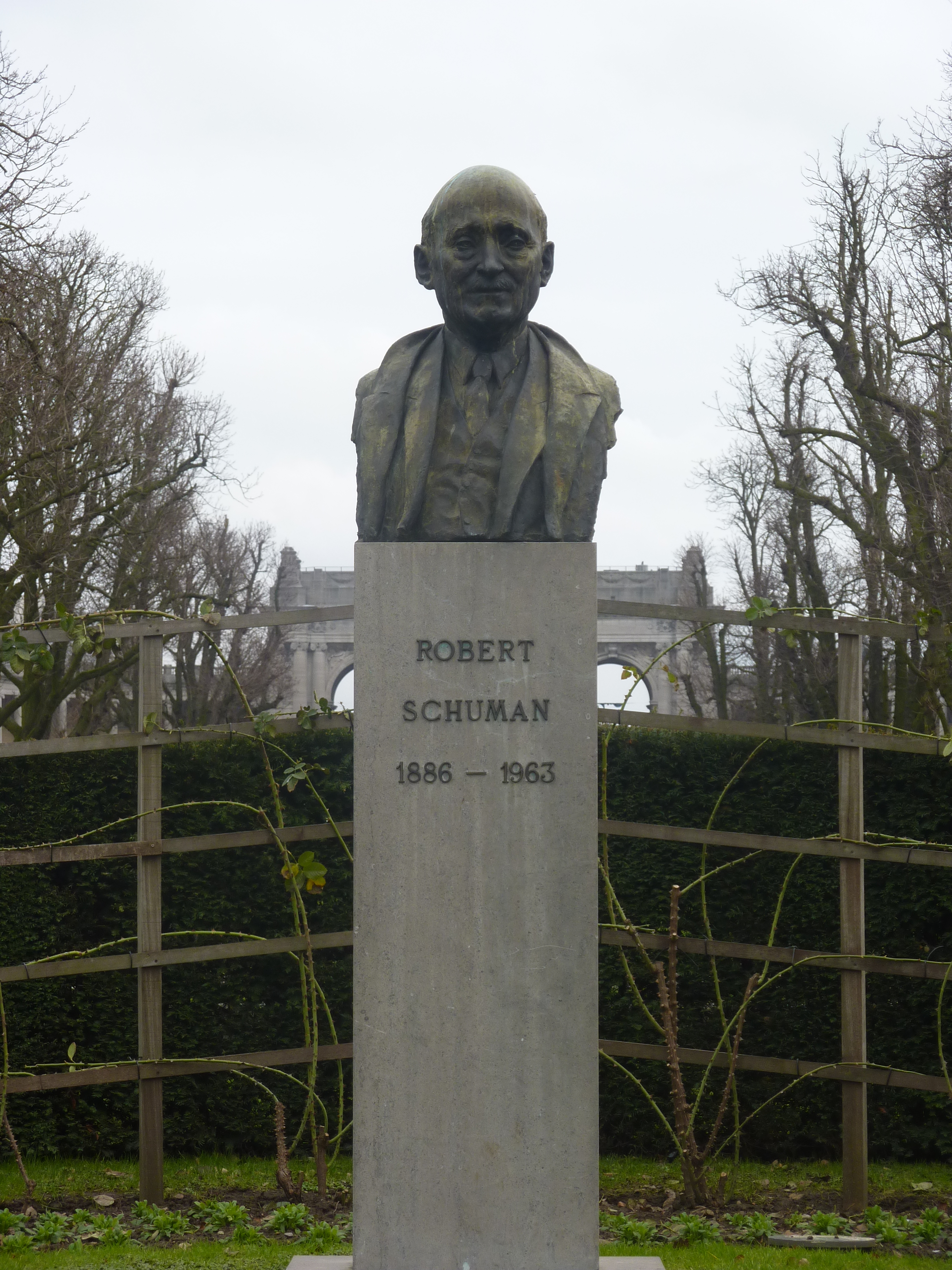 Buste de Robert Schuman par Nat Neujean au parc du Cinquantenaire à Bruxelles, Belgique.